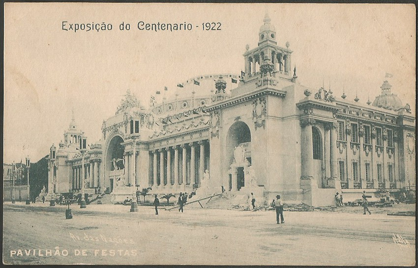 Foto de outro ângulo do palácio.